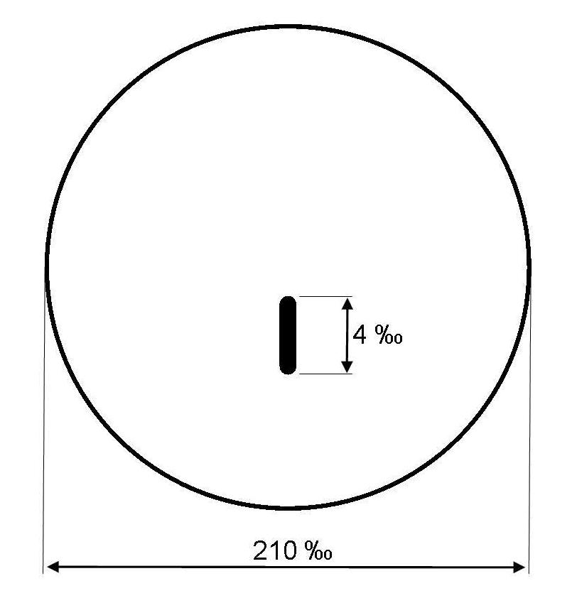 Lunette d'observation et de pointage à rayon infrarouge pour Fass 57